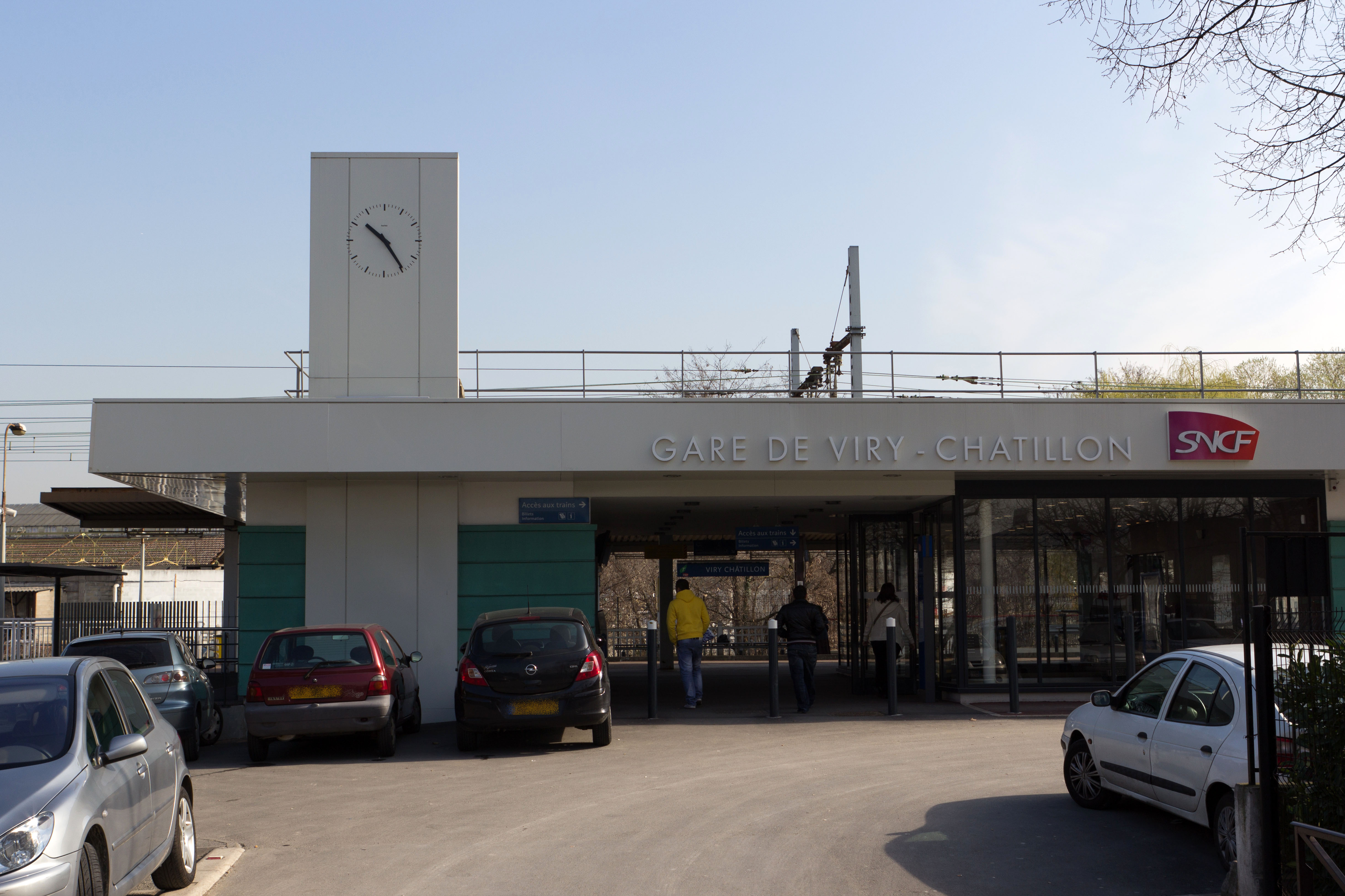 Gare de Viry-Châtillon, Viry-Châtillon, Essonne, France